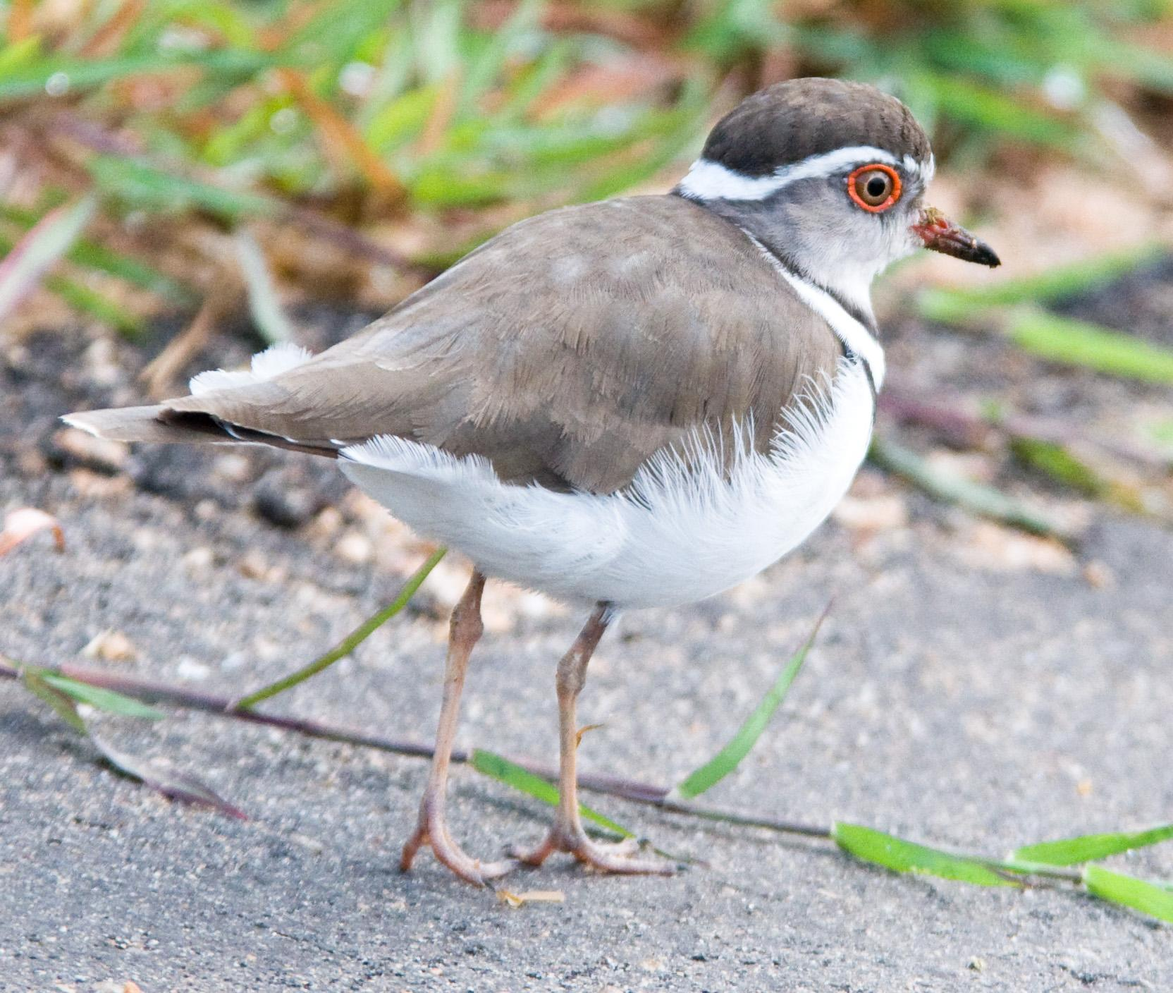 Charadrius_tricollaris